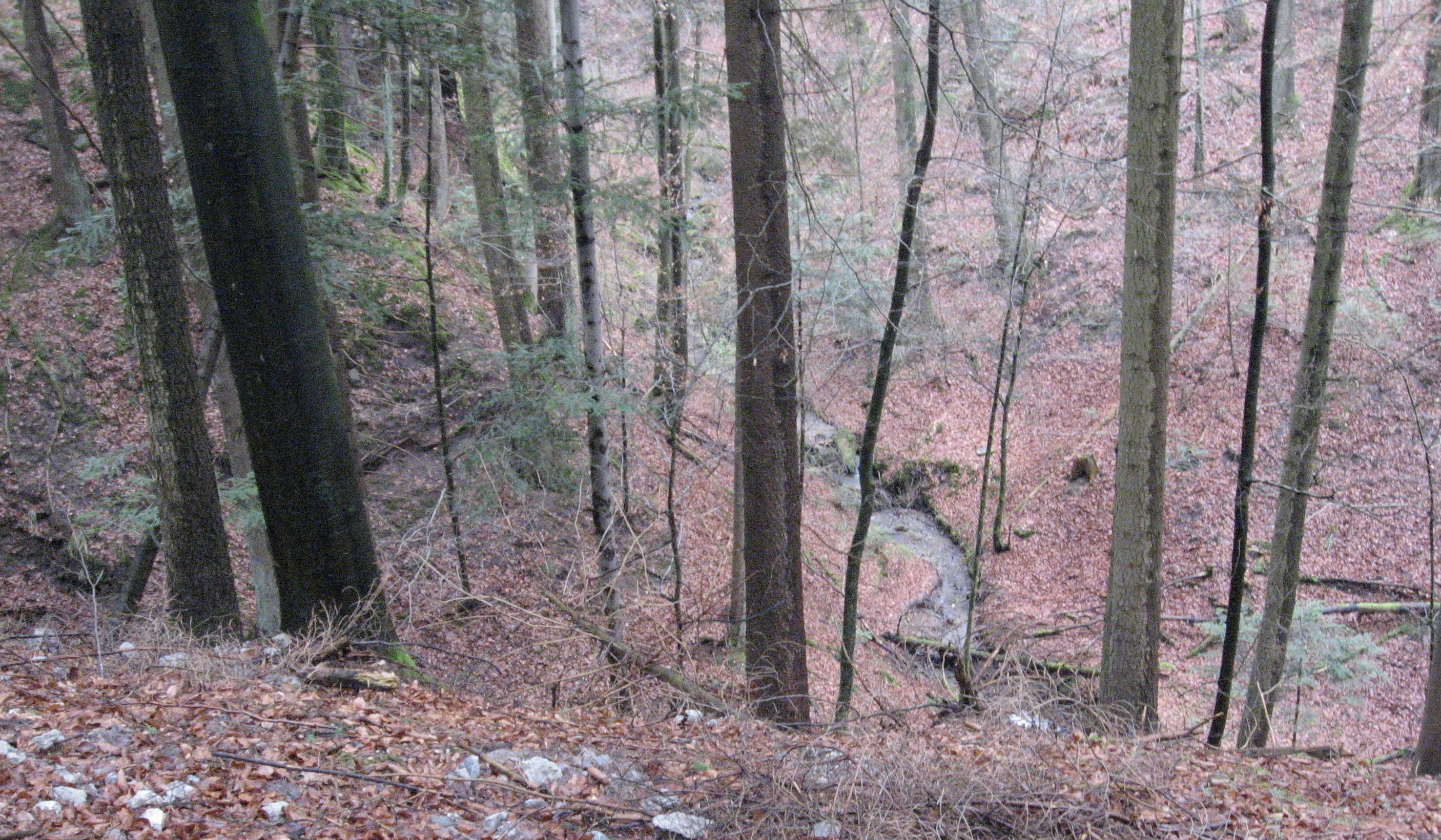 NW-Knick der Schlucht des höheren Avenbach-Zuflusses Reutebach etwa 400 m SSW der Kapelle von Bühlerzell-Holenstein.